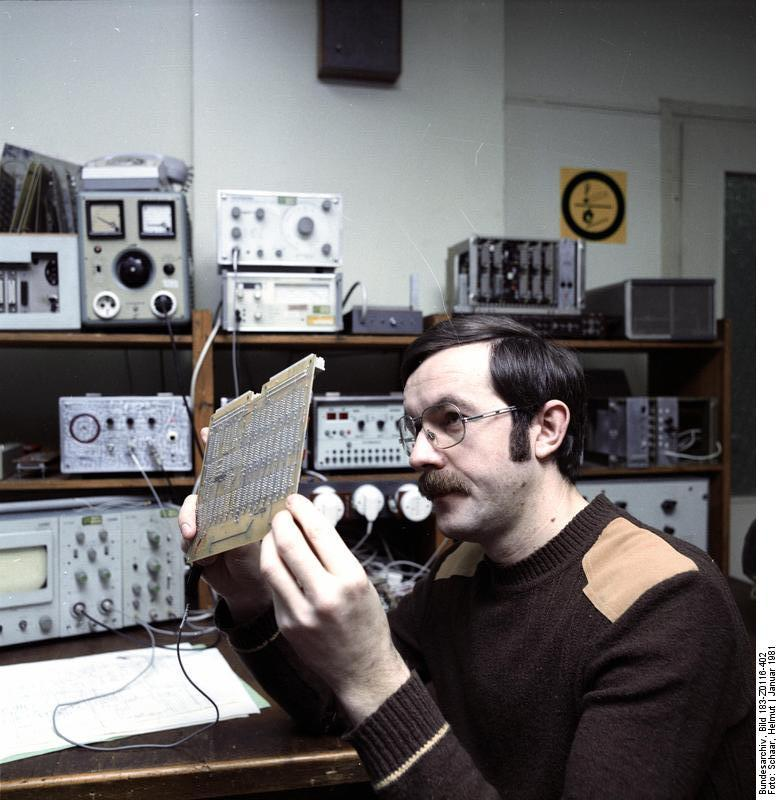 ADN-ZB Schaar 16.1.81 Suhl: Wettbewerb An der Entwicklung einer neuen Datenübertragungseinrichtung arbeitet Dipl. Ing. Wolfgang Sinn im VEB Robotron-Elektronik Zella-Mehlis mit. Er ist Entwicklungsingenieur und Vertrauensmann in der Brigade "Rudolf Breitscheid". Wissenschaftlich-technische Spitzenleistungen, schöpferische Lösungen sowie Verkürzungen der Entwicklungs- und Überleitungszeiten sind Maßstäbe, an denen er sich orientiert.